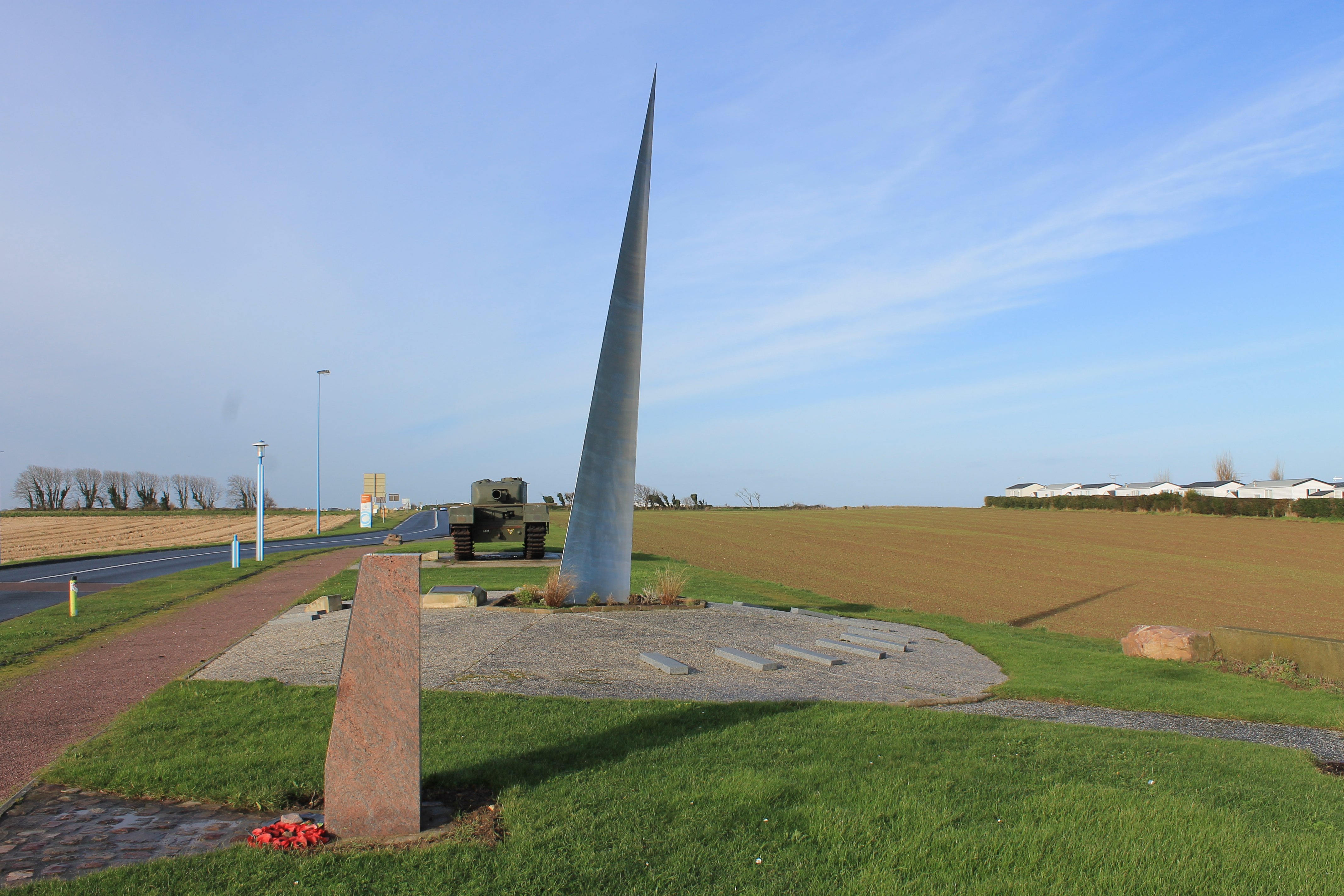 Monument de la Liberté érigé (le 6 juin 1994) à la mémoire du 41 Royal Marines Commando qui a débarqué sur la plage à l'heure indiqué à l'emplacement d'une pierre sur le cadran solaire au sol le 6 juin 1944 à Lion-sur-Mer (Calvados)